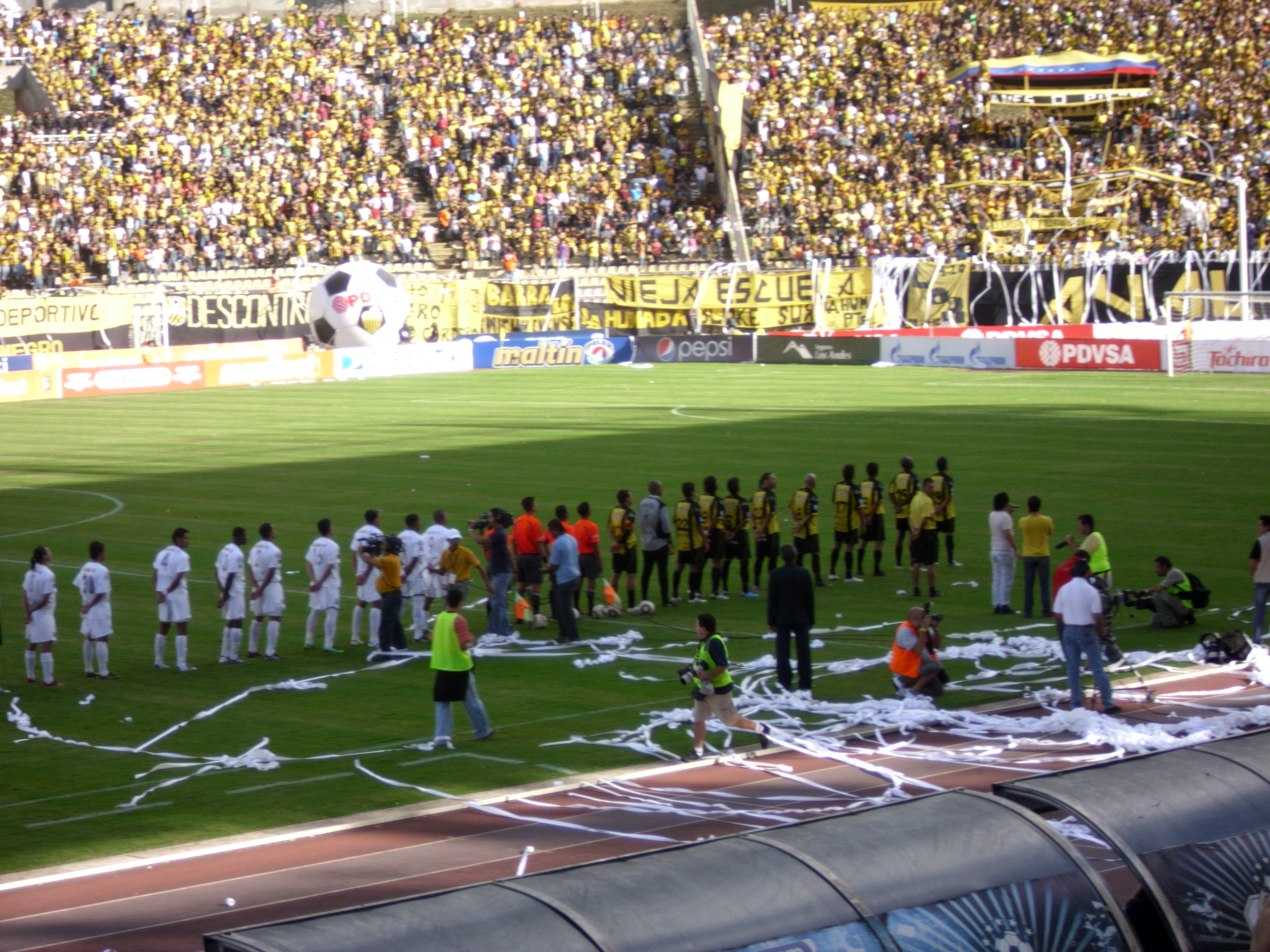 Futbolistas del Deportivo Táchira y Real Esppor interpretando el Himno Nacional de Venezuela.